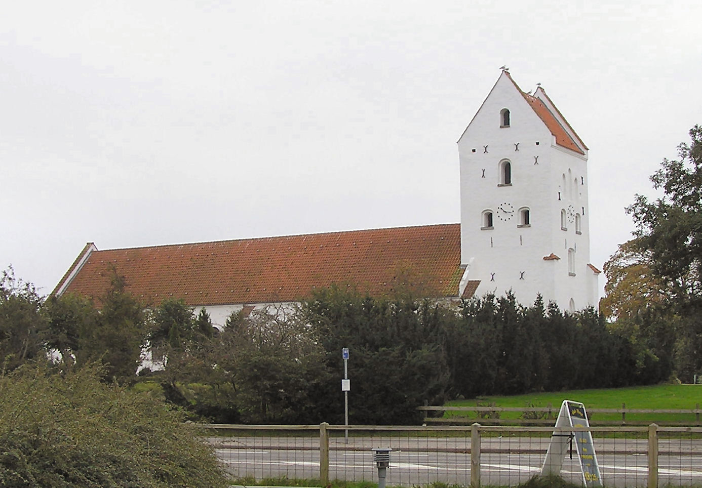 Hals Kirke,Aalborg Stift